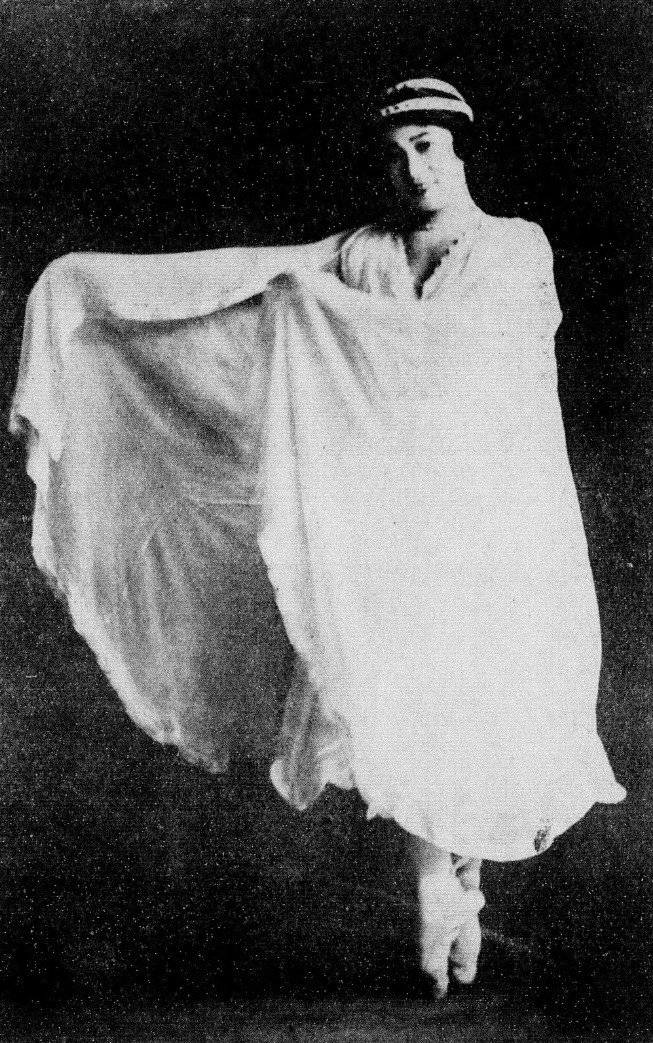 今村静子 1919